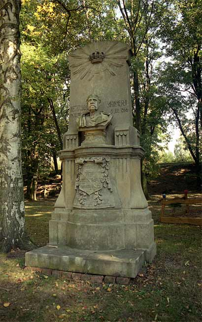 pomník z války roku 1866